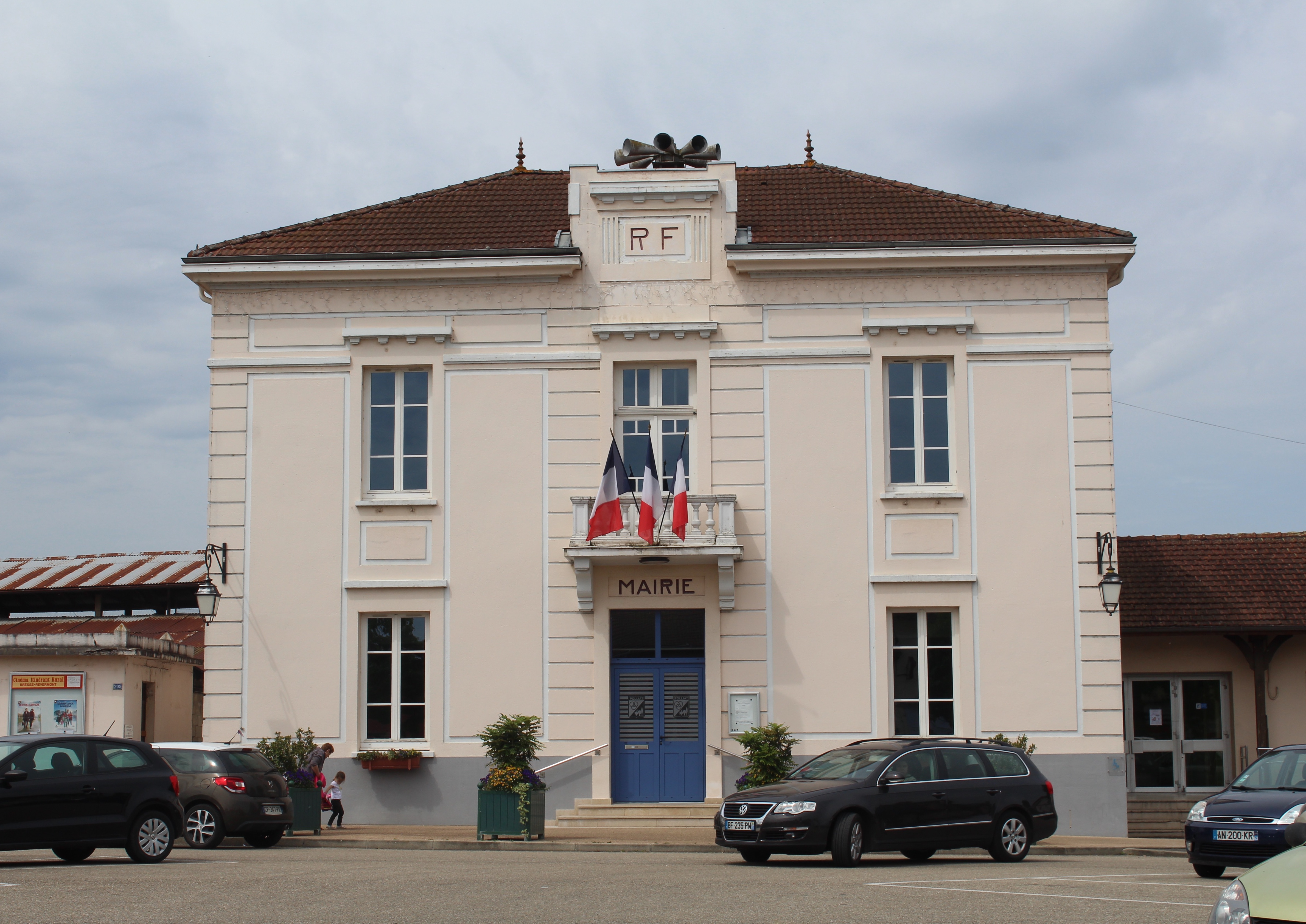 Mairie de la commune de Polliat.